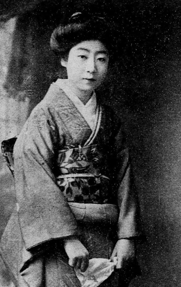 川田芳子 1919